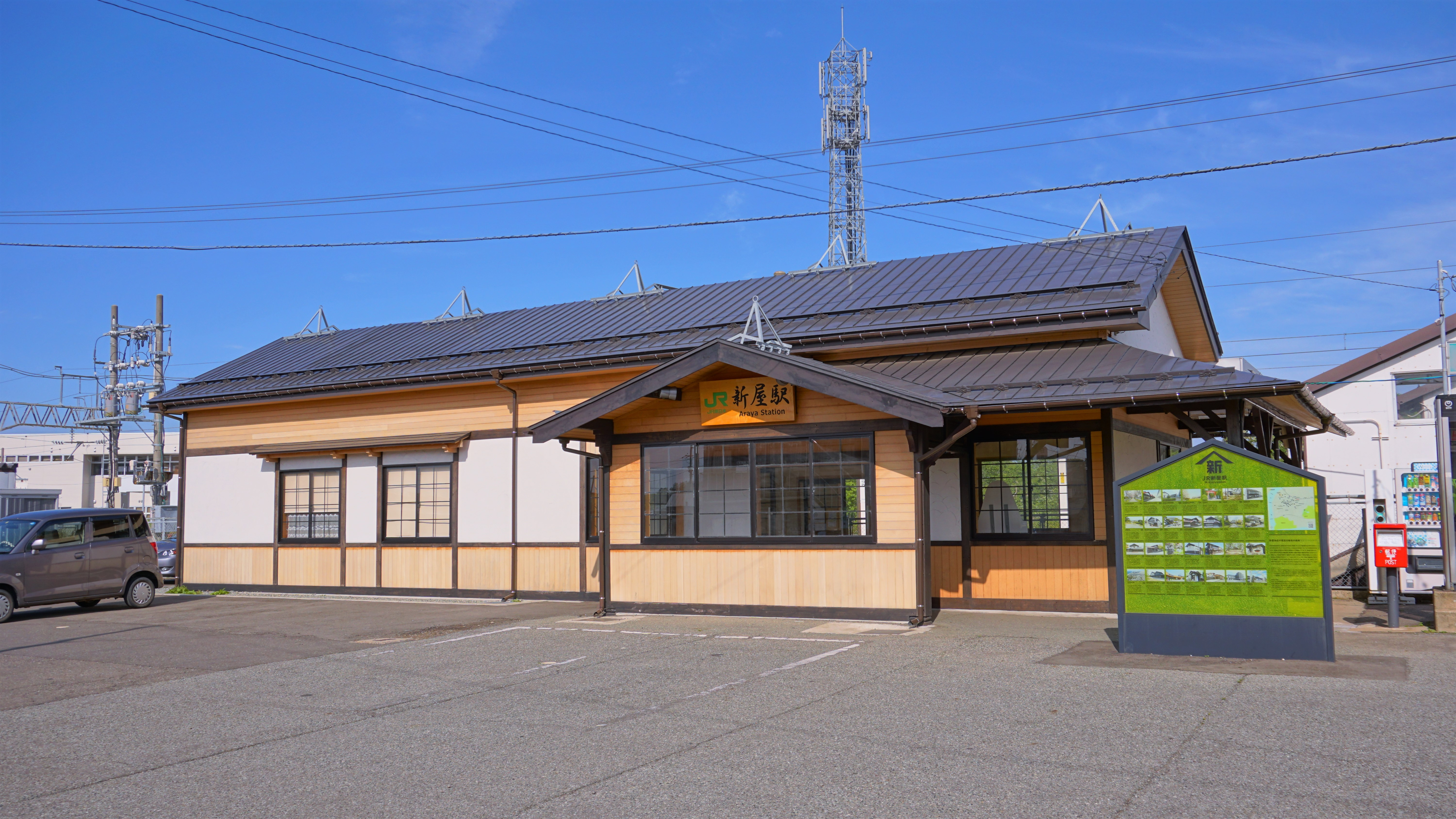 羽越本線 新屋駅